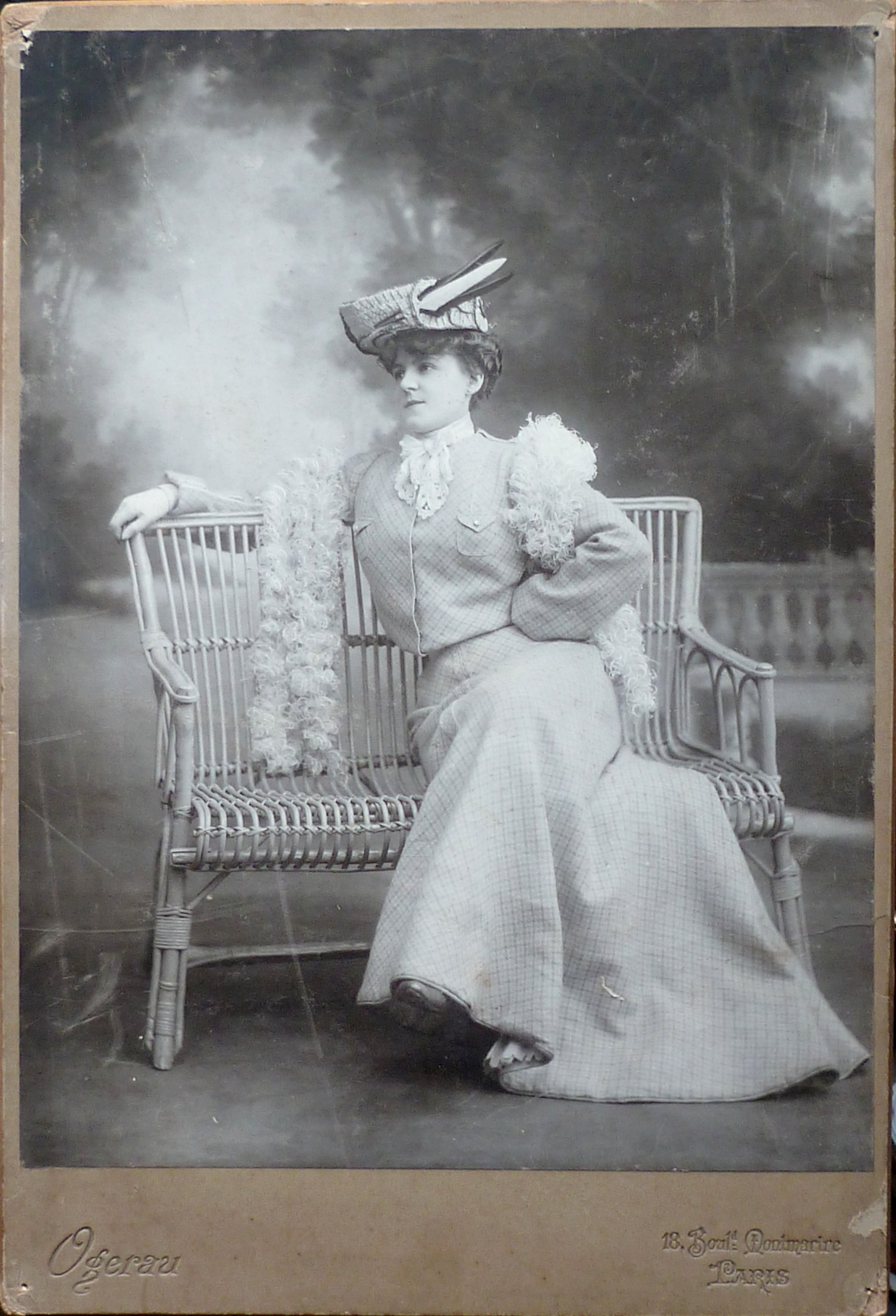 Femme en toilette, photographie de studio par Charles Ogerau. Dimension du cliché 20,5 x 27,5 cm, sur carton du photographe, vers 1895, collection personnelle.